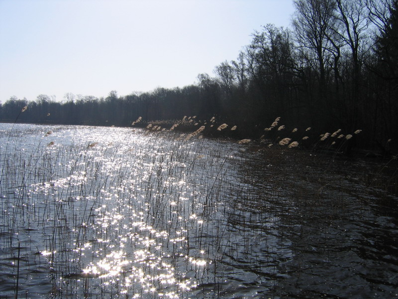 Ringsjön in Sweden